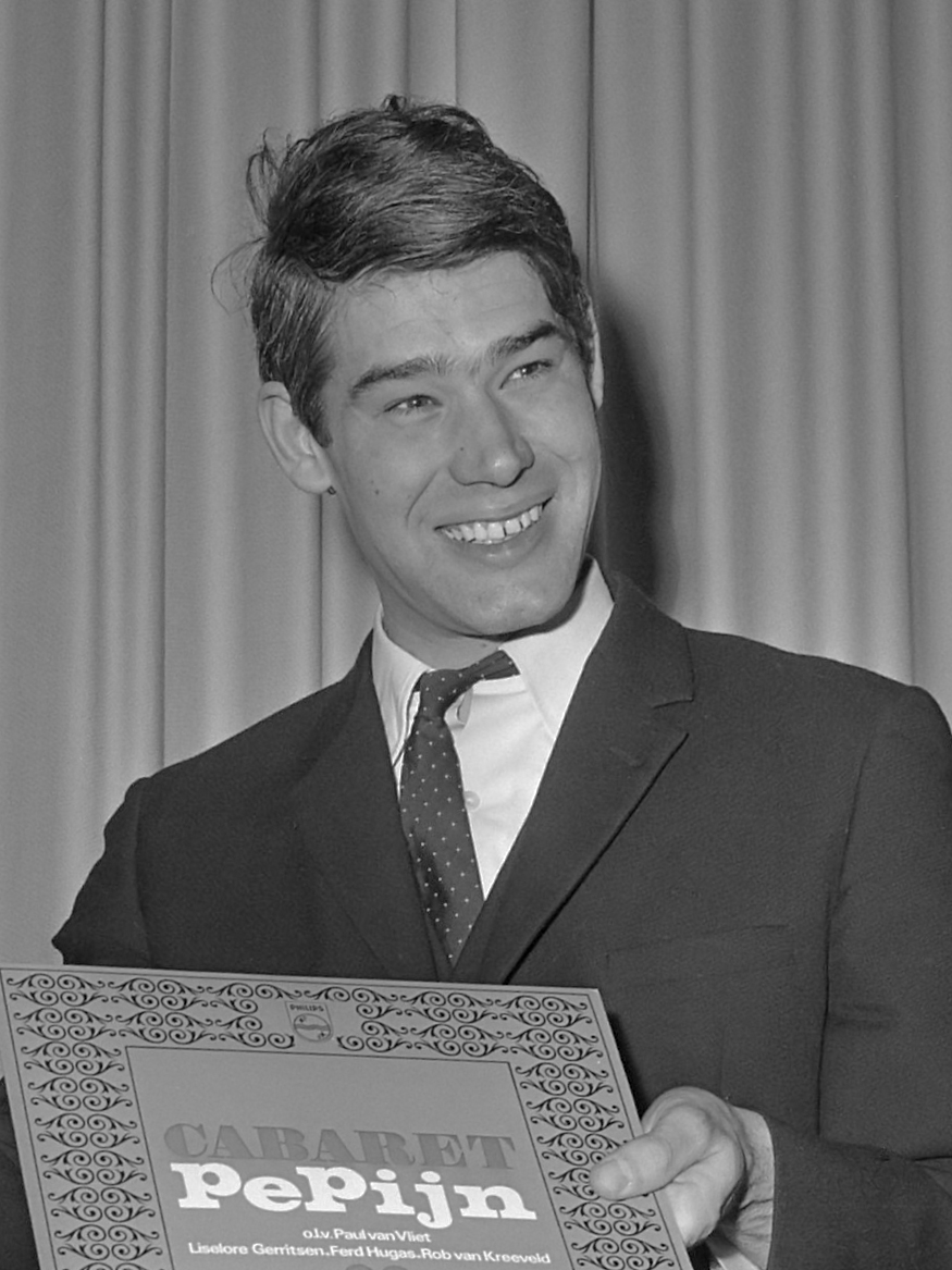 In theater Pepijn , Paul van Vliet eerste plaat aangeboden van zijn cabaret aan minister Vrolijk 23 maart 1966